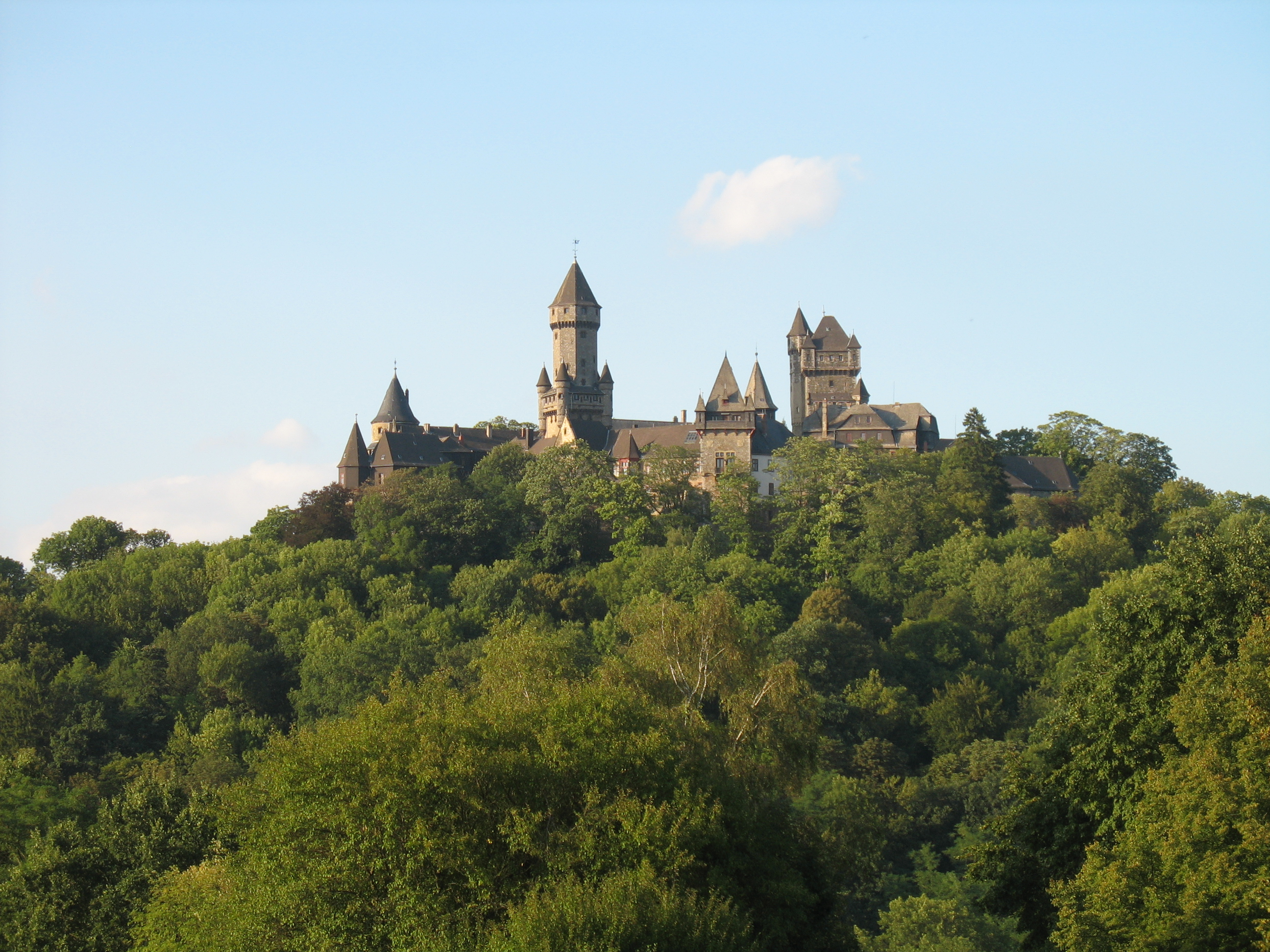 Schloss Braunfels.